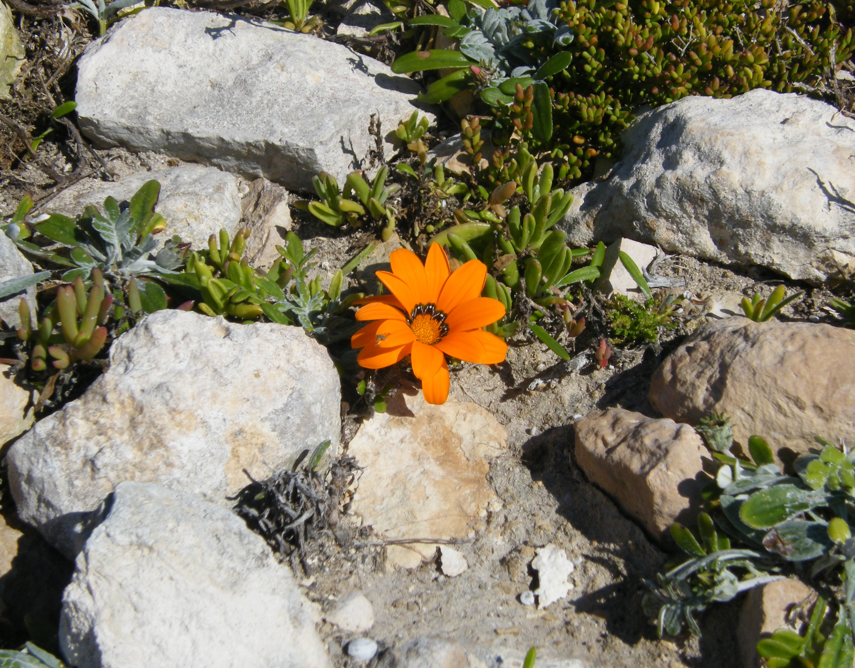 rooi gousblom